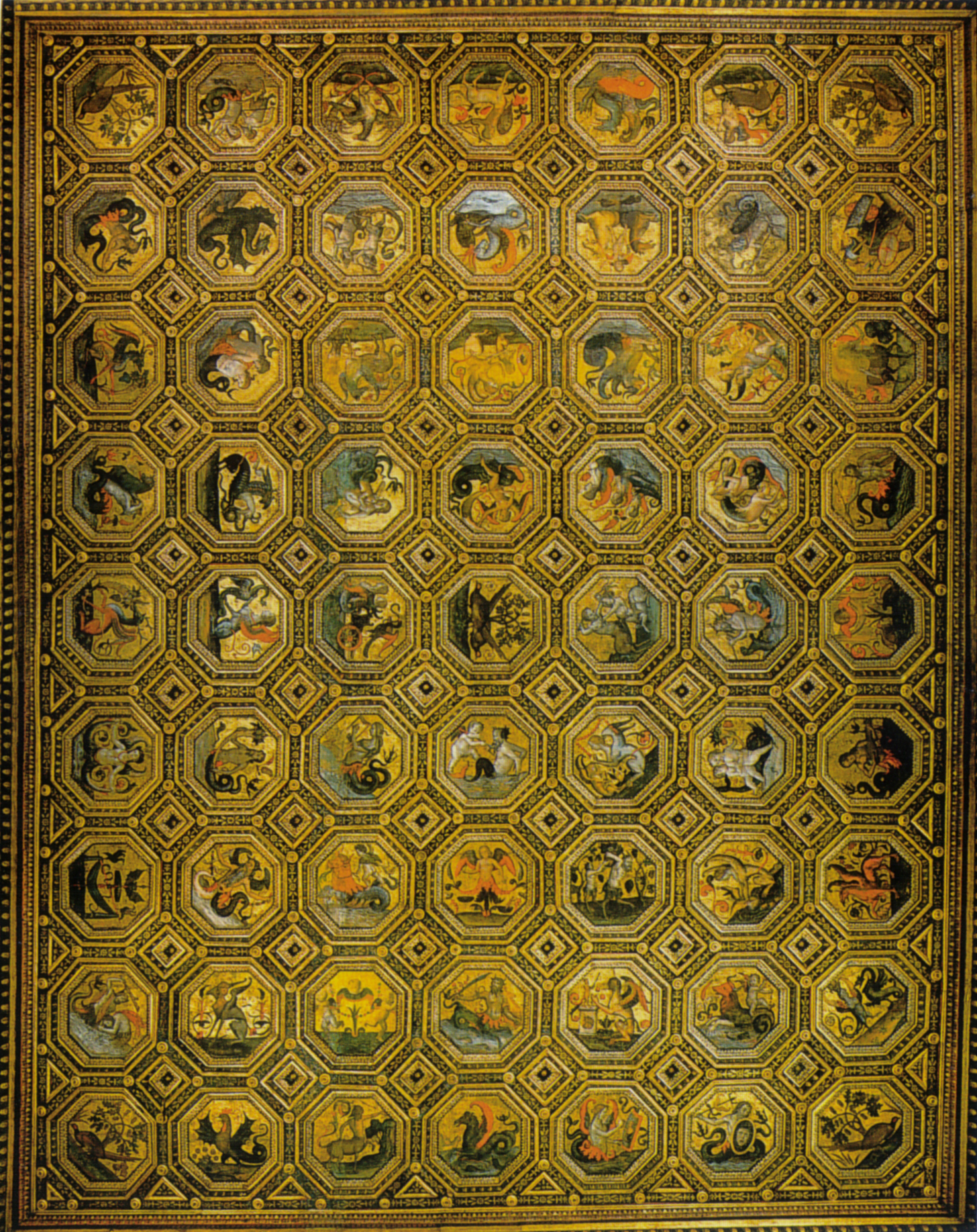 Pinturicchio, soffitto dei semidei, 1490, roma, palazzo dei penitenzieri